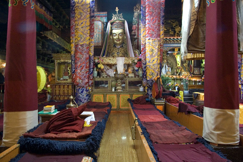 Jokhang Temple, Lhasa, Tibet